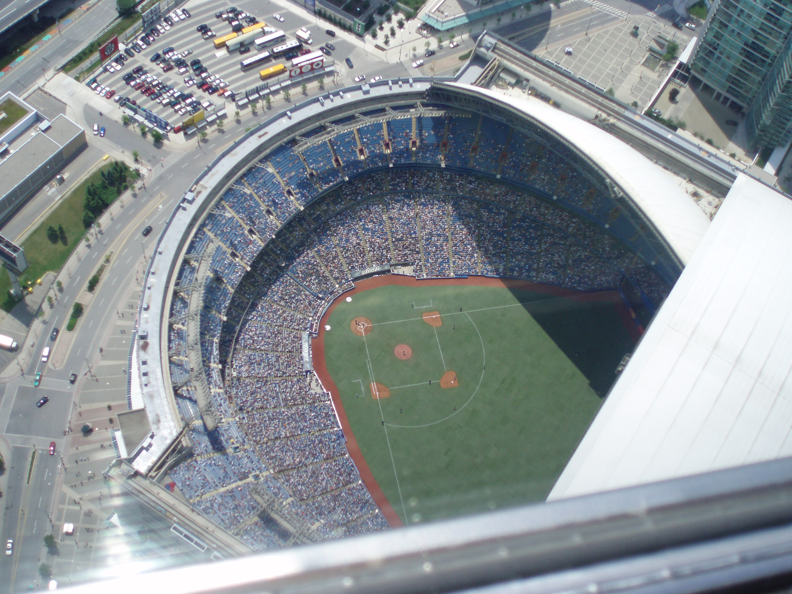 Ze CN tower se dají opravdu vidět zajímavé věci :)